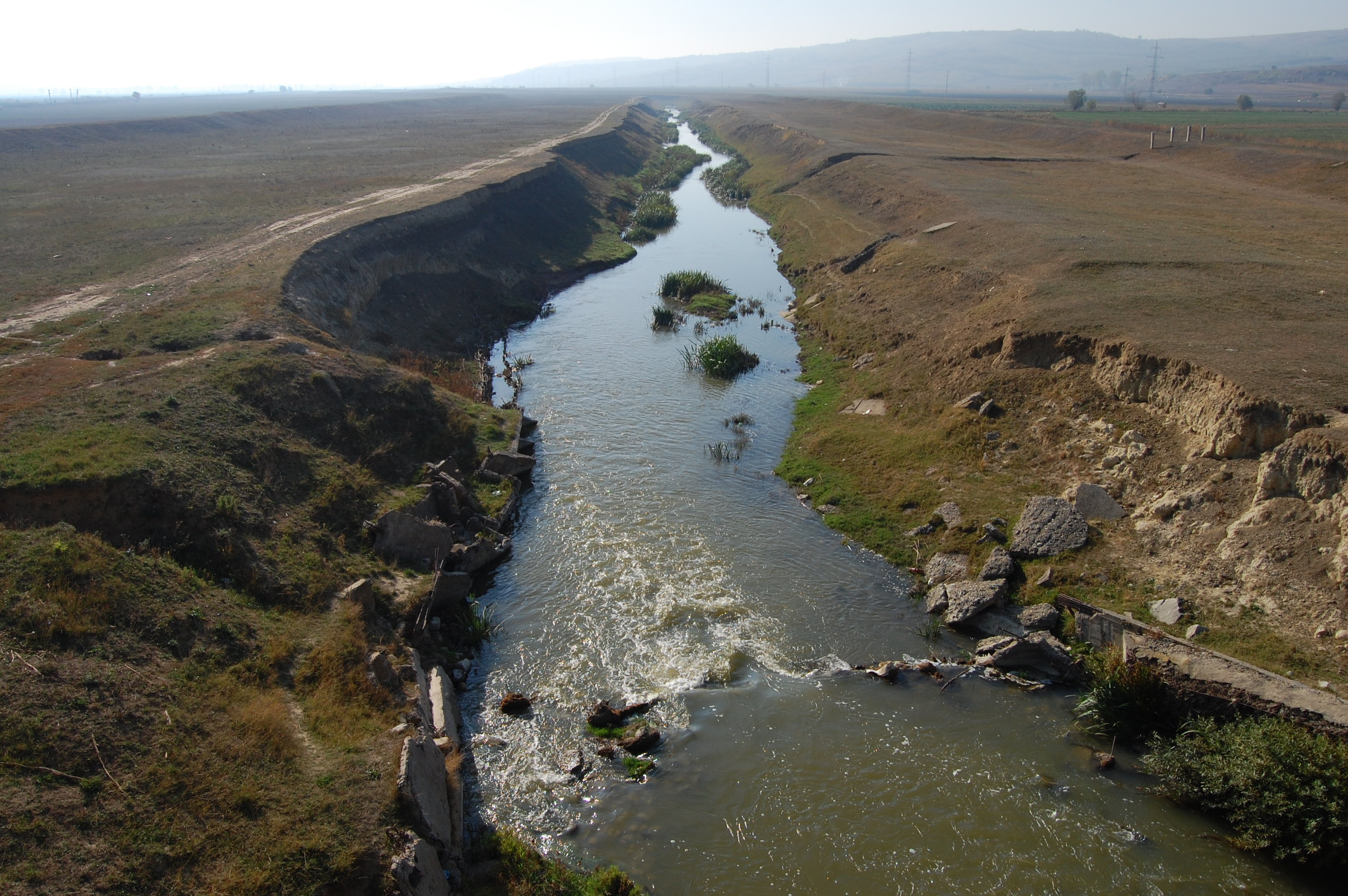 Râul Bârlad fotografiat în apropiere de Muntenii de Jos, judeţul Vaslui. 9 octombrie 2009.